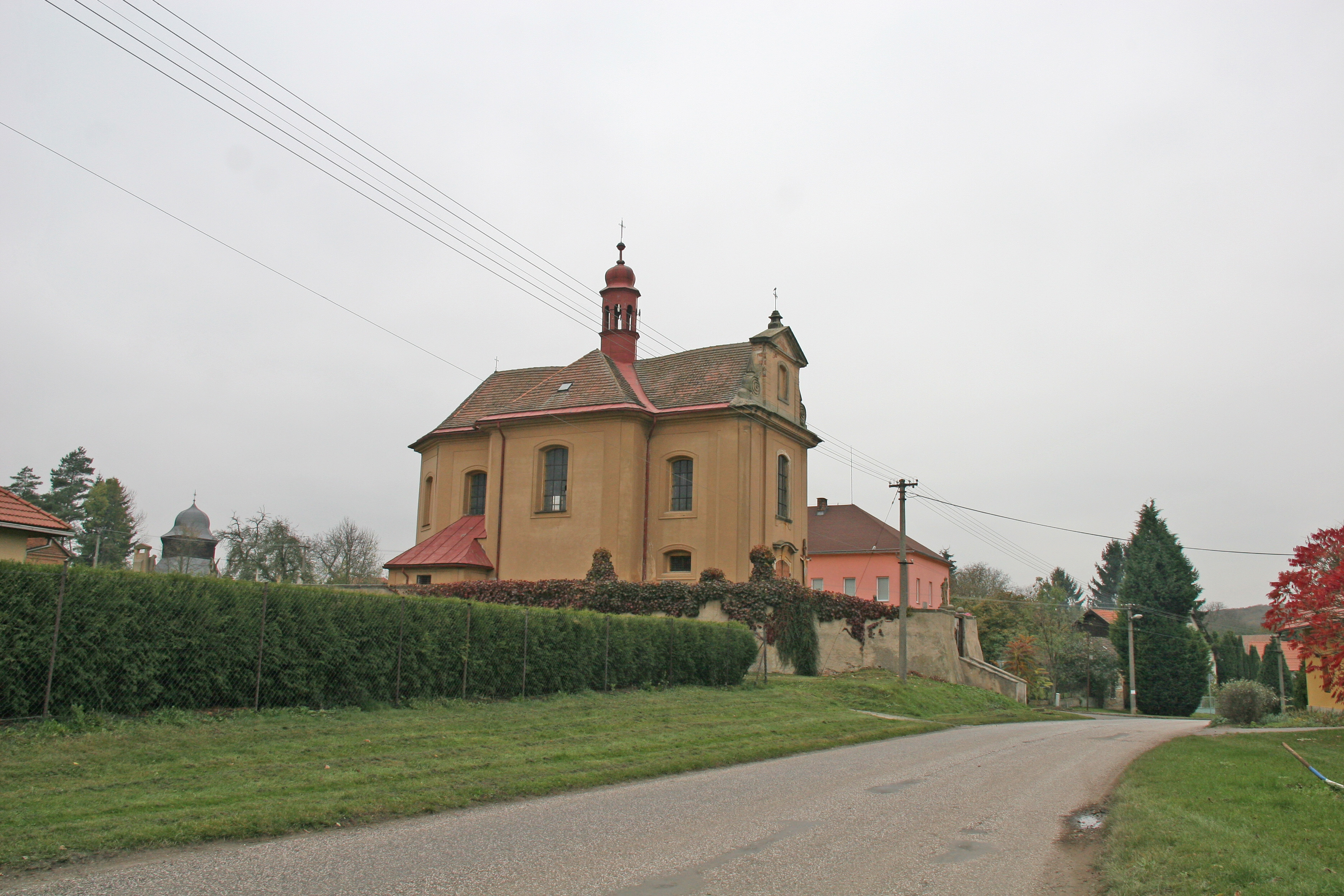 Kostel svatého Vavřince, Vršce.